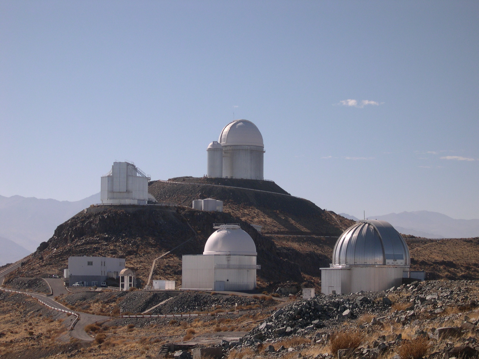 Vue de l;observatoire de La Silla, où pour une fois, on voit très bien le NTT.